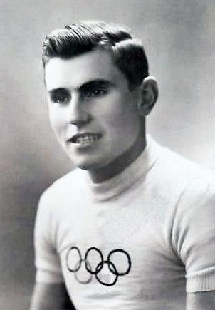 André Noyelle, dubbel na de oorlog Olympisch kampioen in Helsinki.